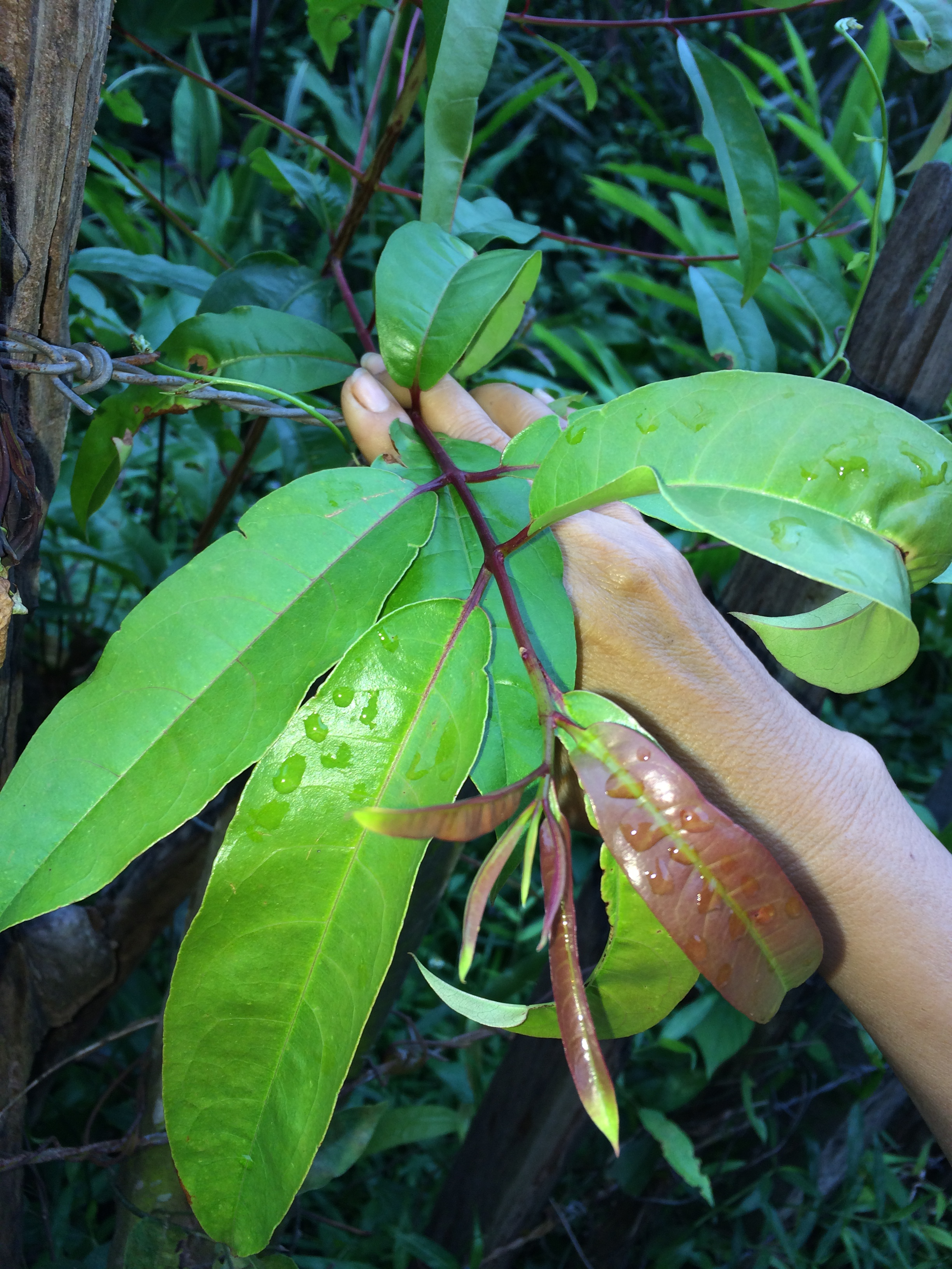 Cet arbre figure dans de nombreux jardins de l’Isan et du Laos. On ramasse les jeunes feuilles comestibles, qui portent au Laos des noms différents selon qu’elles sont soit aigre (ສົ້ມ), lisse (ມ່ອນ) ou rouge sang (ເລືອດ). On peut les consommer crues en accompagnement ou trempées dans nam phrik. On les trouvent aussi dans certaines soupes Isan avec des champignons. Les taille des branches hors de portée de cueillette permettent faire du charbon de bois de bonne qualité.